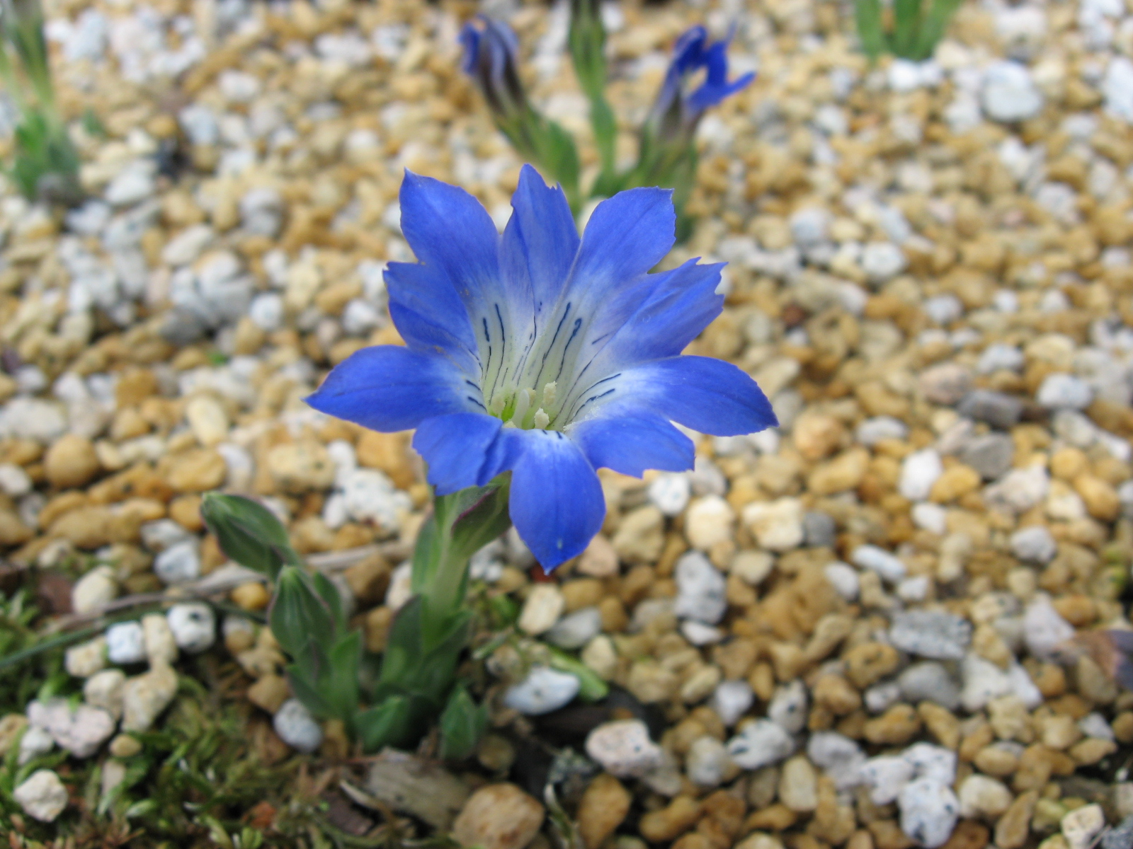 ハルリンドウ (箱根湿性花園で撮影)